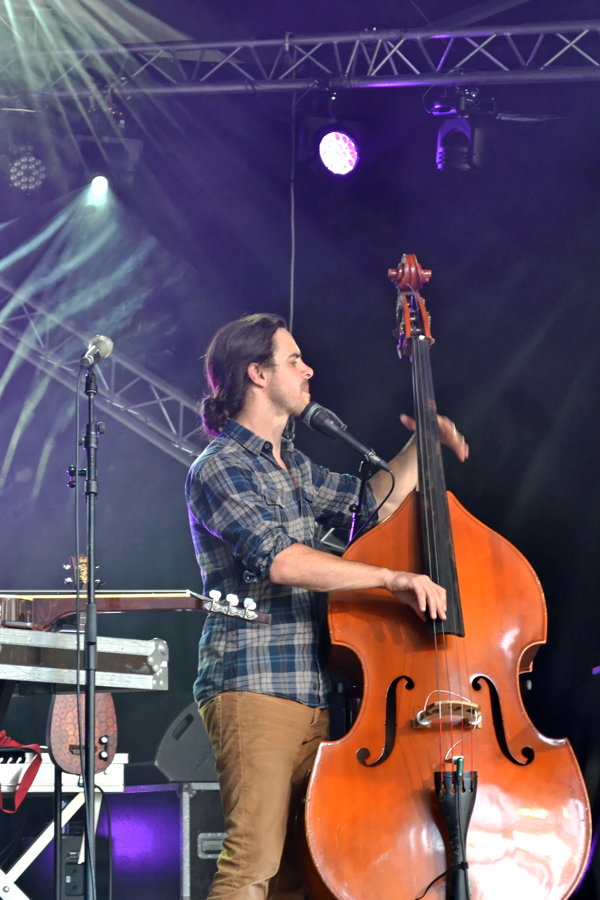 Krismenn en concert à l'espace Pierre Jakez Hélias lors du festival de Cornouaille le 25 juillet 2014.